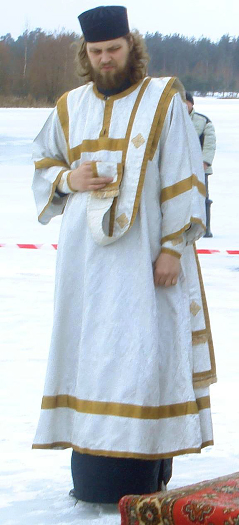 Иеродиакон